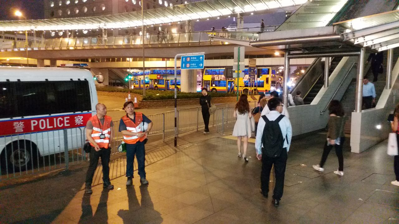 中文（香港）: 港鐵中環站列車相撞事故期間，駐留在中環站A出口外的港鐵職員。